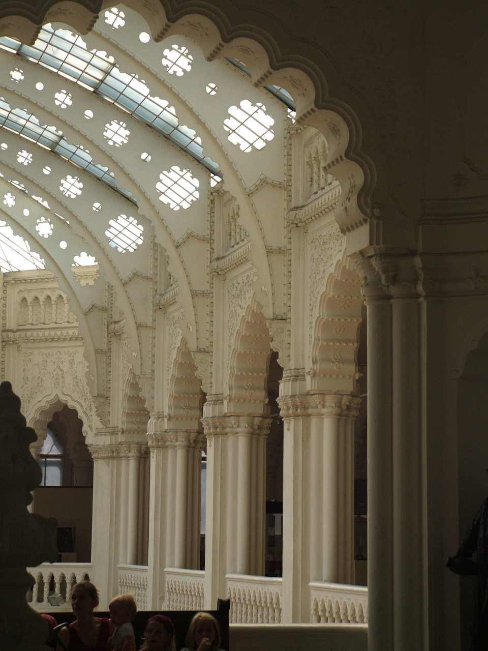 Iparművészeti Múzeum (Budapest 9, Üllői út 33-37., Hőgyes Endre utca 10-12., Kinizsi Pál utca 31.) This is a photo of a monument in Hungary. Identifier: 1070